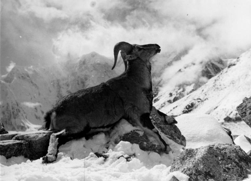 Kanch, erbeuteter Blauschafwidder